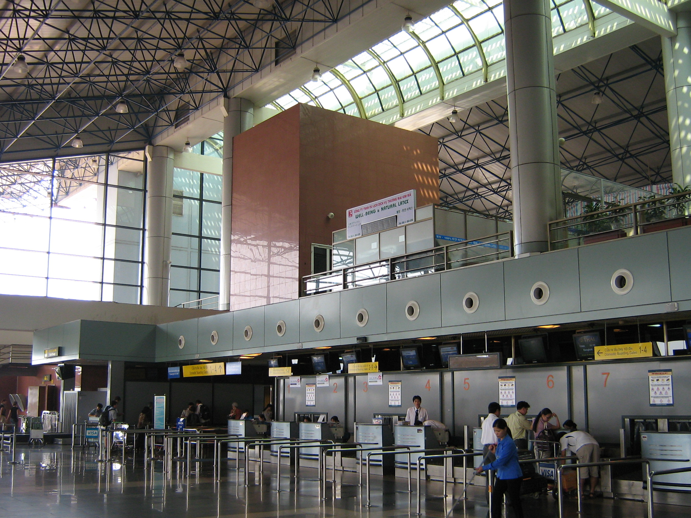 Terminalinterieur in Noi Bai